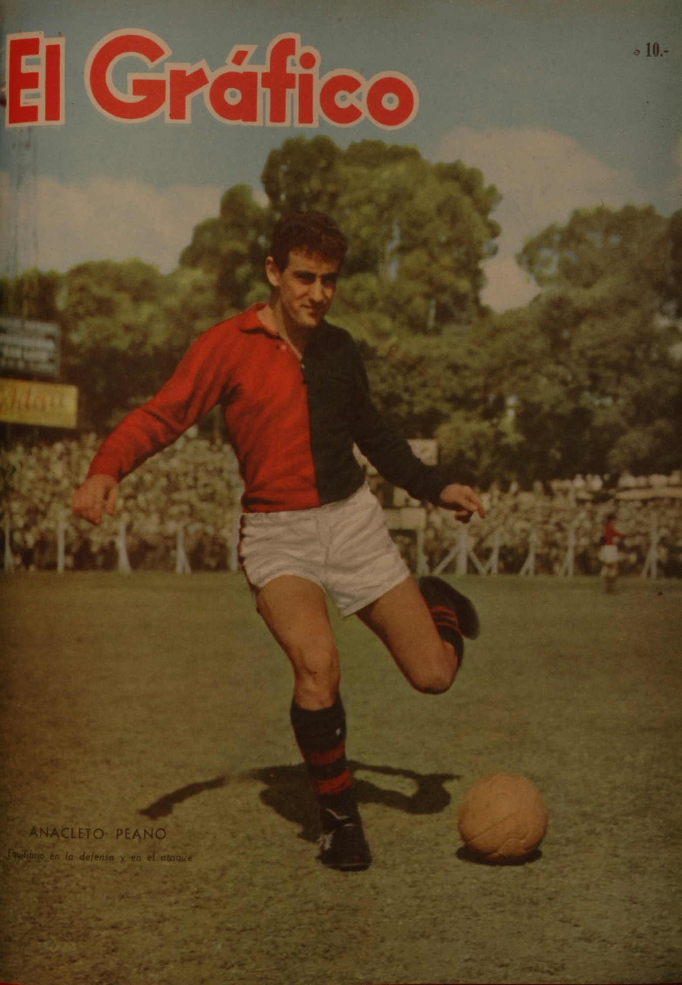 El Grafico del 19 de Octubre de 1960. Edicion 2143